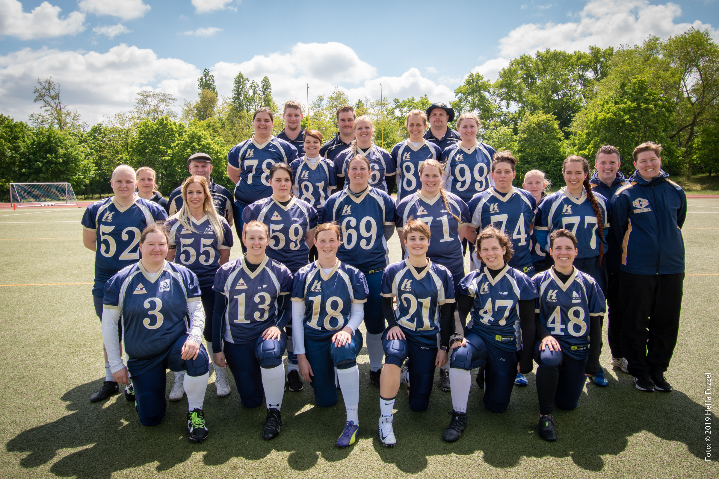 Teamfoto der TSV SCHOTT Mainz Golden Eagles Damen, Team 2019